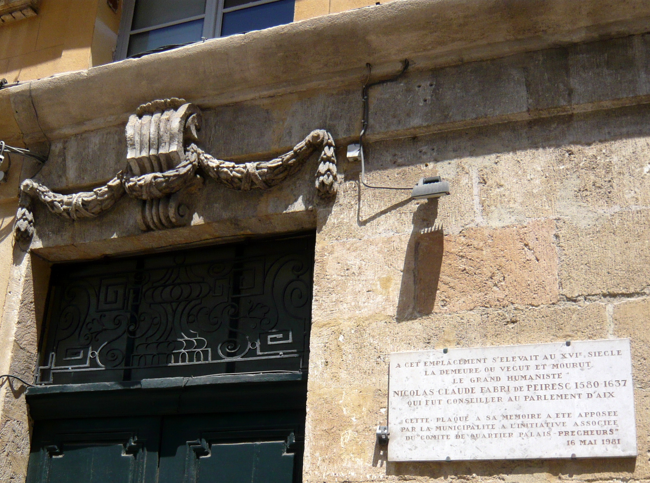 Plaque Peiresc, 8 rue Peiresc, Aix-en-Provence (France).